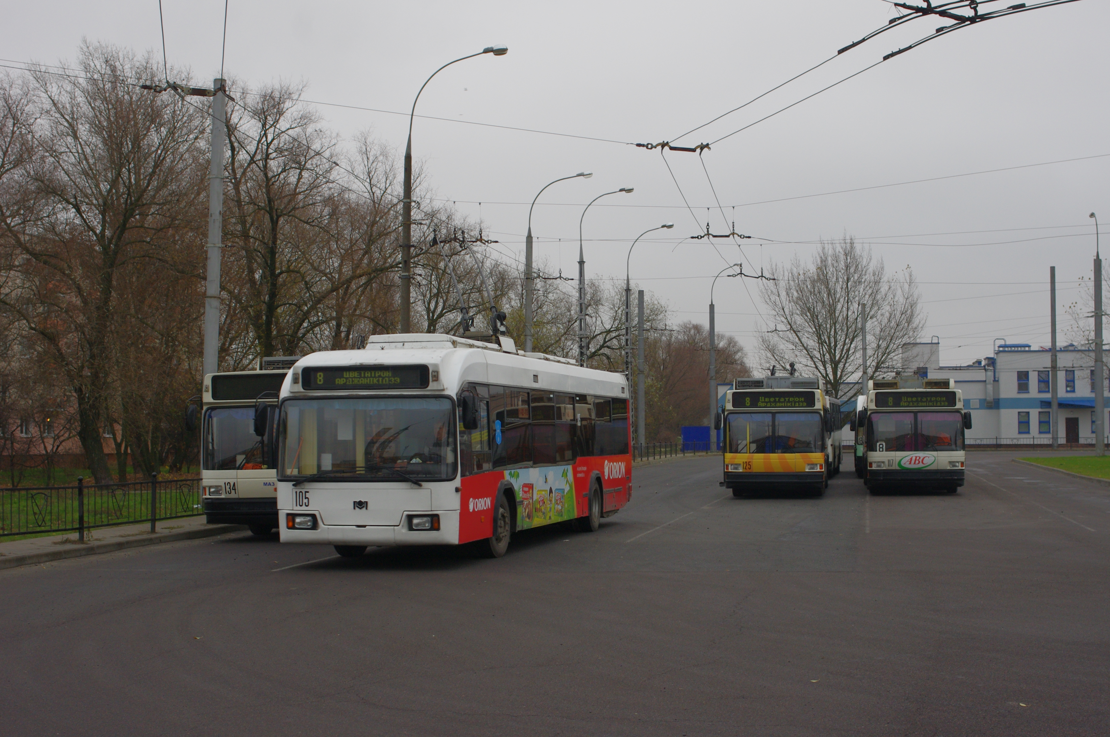 BKM 32102 №105(2006) Брэсцкі тралейбус